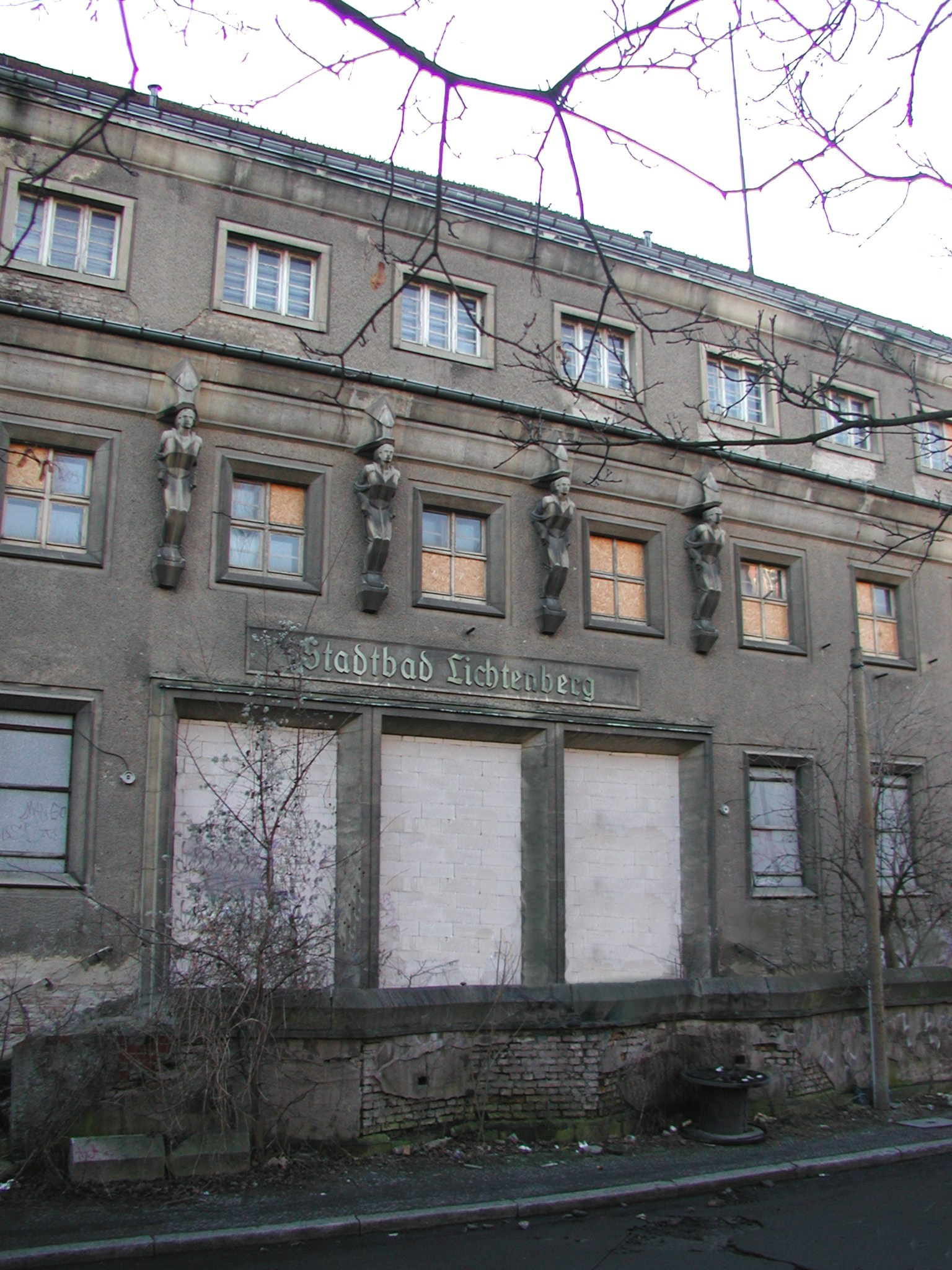 Stadtbad Lichtenberg, Eingangsbereich mit Freitreppe und Fassadenschmuck